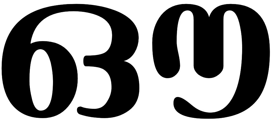 ഔ അക്ഷരം